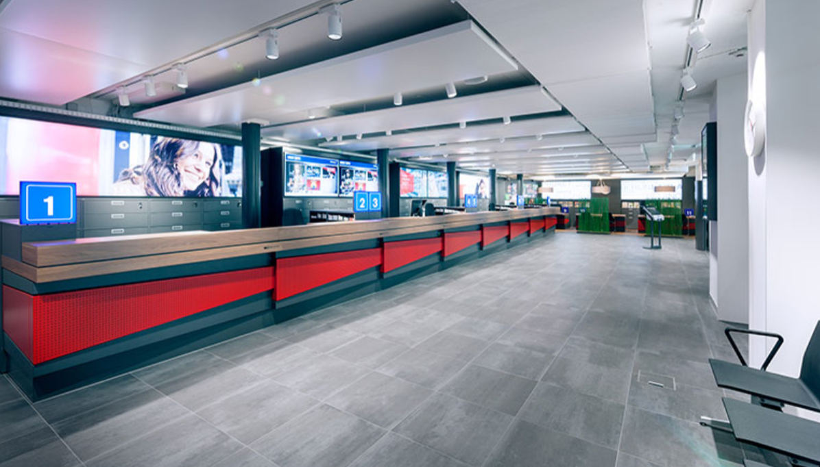 Reisezentrum Winterthur